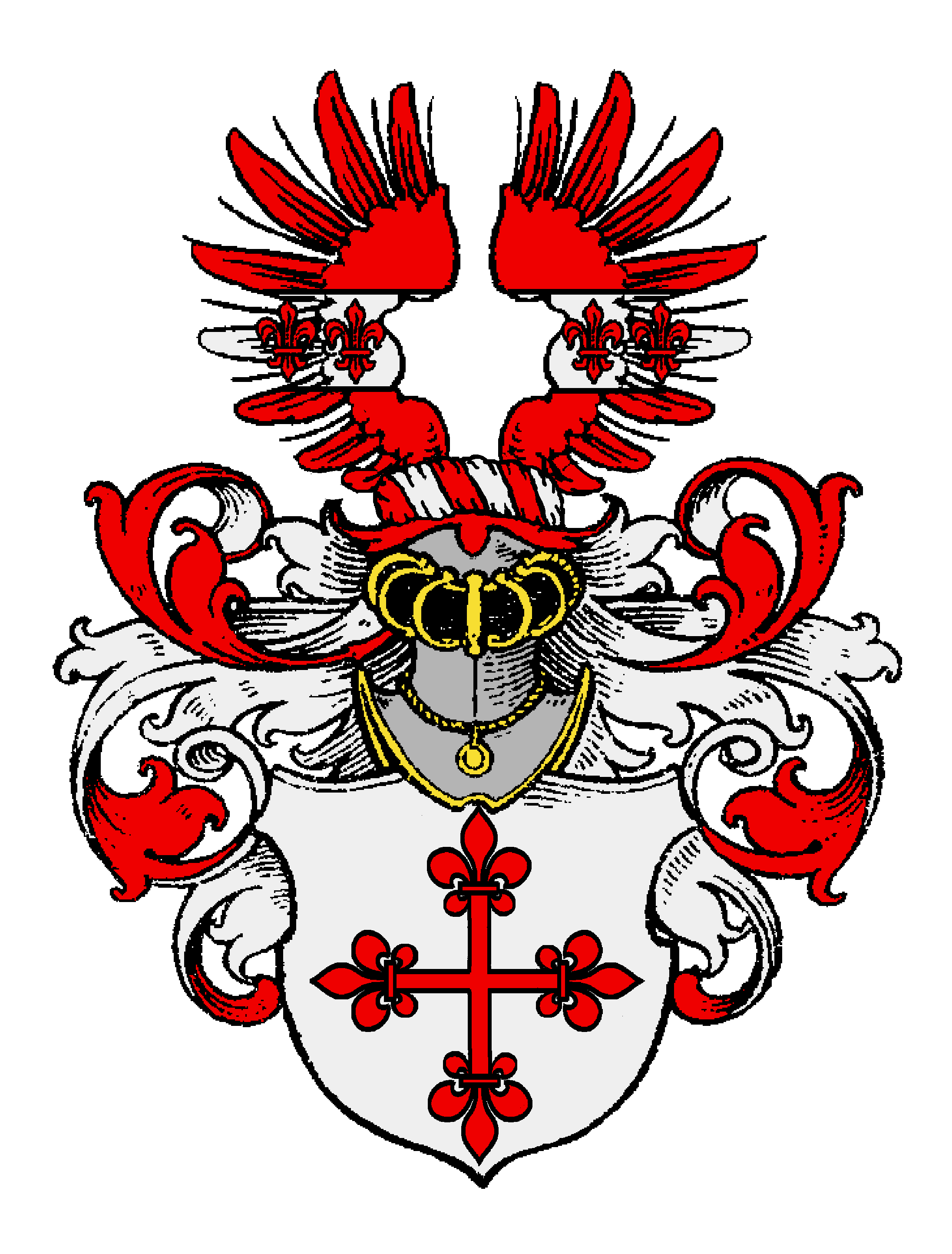 Wappen der von Broi(t)zem